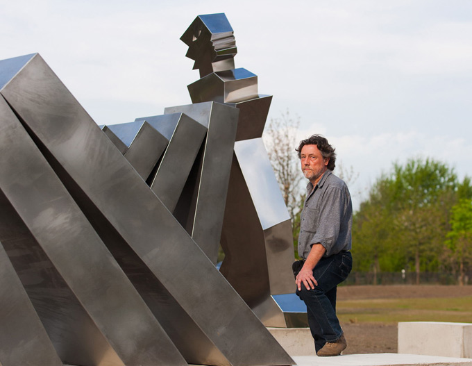 Thomas Reimann bei der Plastik „Adam und Eva“ (2010) im „Paradies-Garten“ in Hoyerswerda